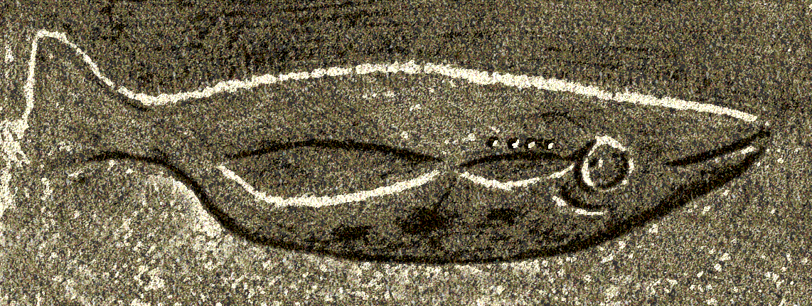 Pez (¿salmón?) en relieve de la cueva de Gorge d'Enfer (Les Eyzies, Dordoña, Francia)